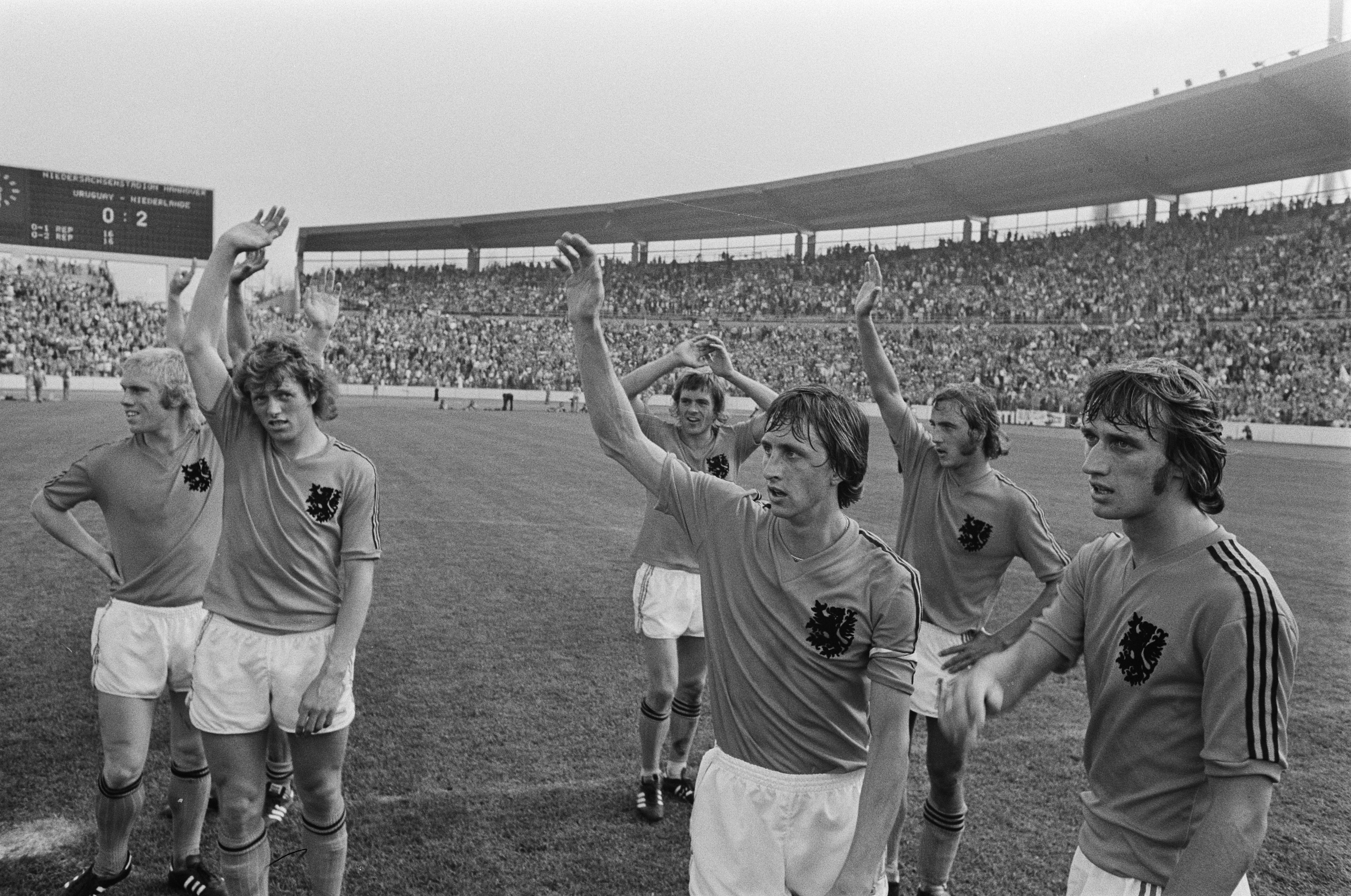 Collectie / Archief : Fotocollectie Anefo Reportage / Serie : [ onbekend ] Beschrijving : Wereldkampioenschap voetbal 1974; Nederland tegen Uruguay 2-0; spelers bedanken publiek na afloop, midden voorgrond Cruijff Datum : 15 juni 1974 Trefwoorden : sport, voetbal, wereldkampioenschappen Persoonsnaam : Cruijff, Johan Fotograaf : Verhoeff, Bert / Anefo Auteursrechthebbende : Nationaal Archief Materiaalsoort : Negatief (zwart/wit) Nummer archiefinventaris : bekijk toegang 2.24.01.05 Bestanddeelnummer : 927-2587